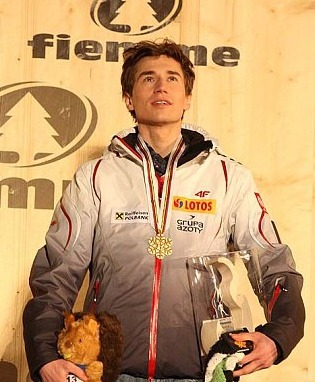 Dekoracja medalowa konkursu indywidualnego mężczyzn na skoczni K-120